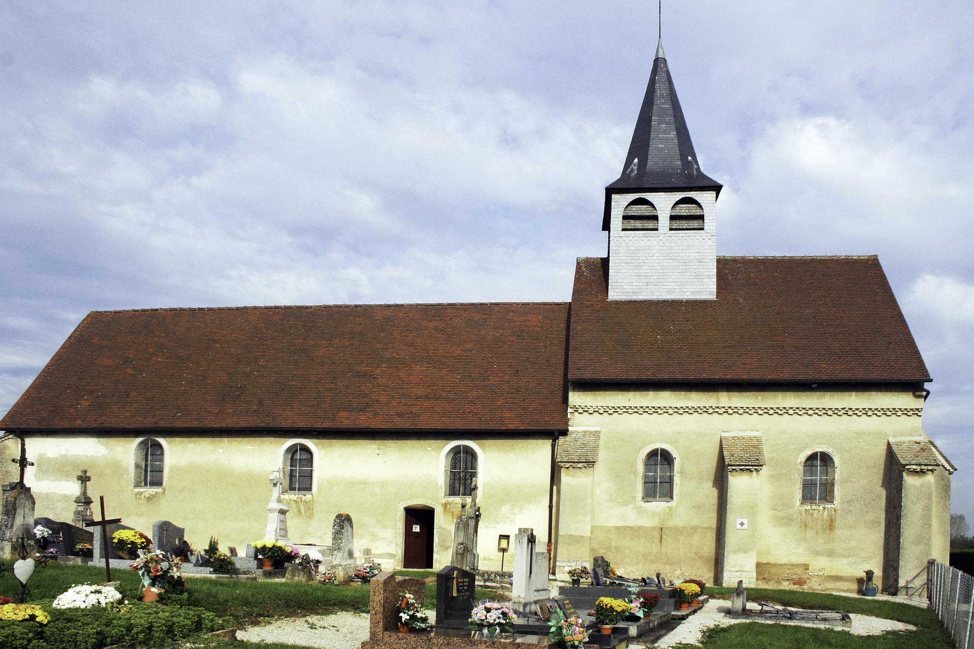 Église de la Nativité de Bagnot (Côte-d'Or), France